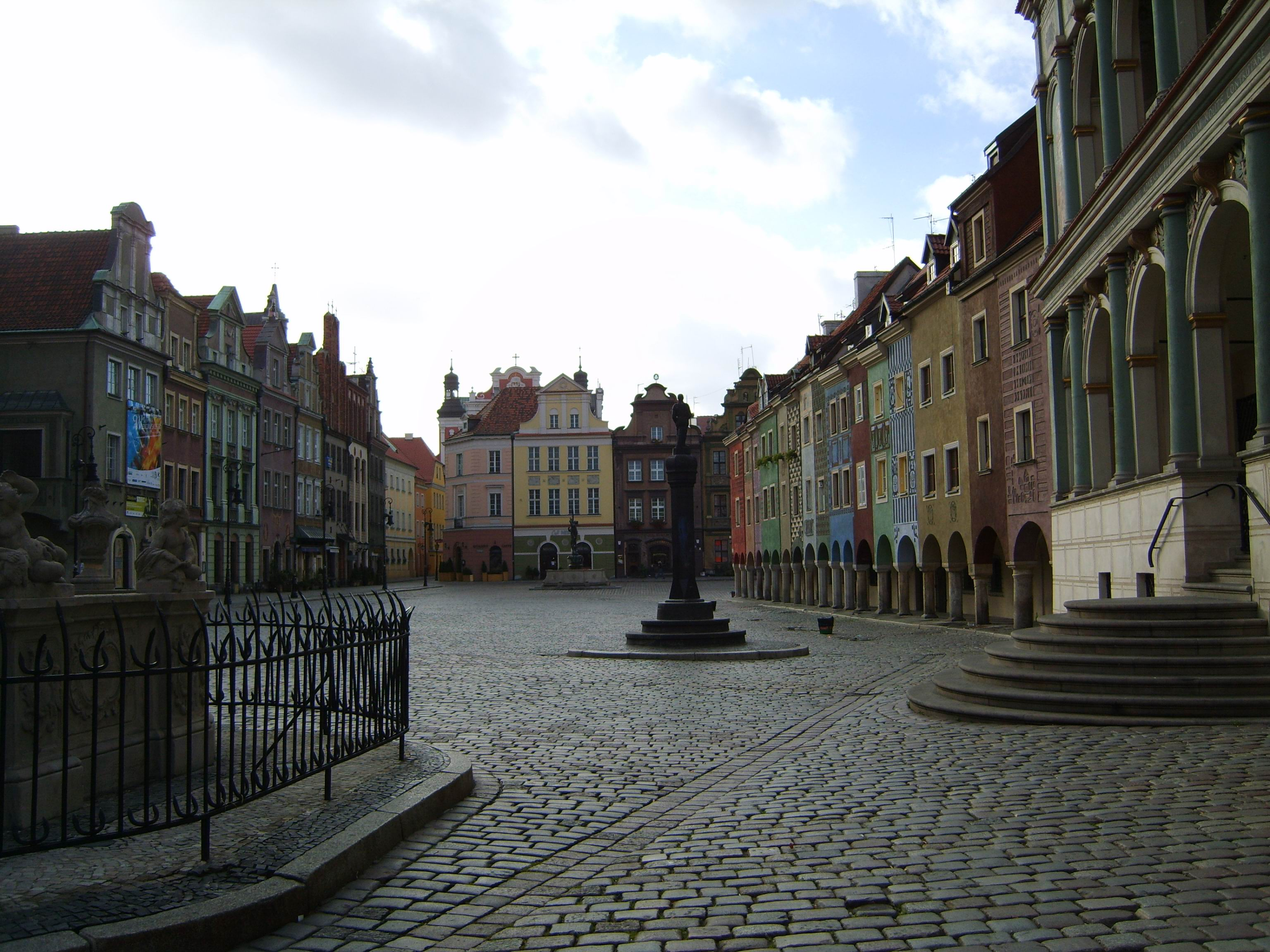 Stary Rynek w Poznaniu